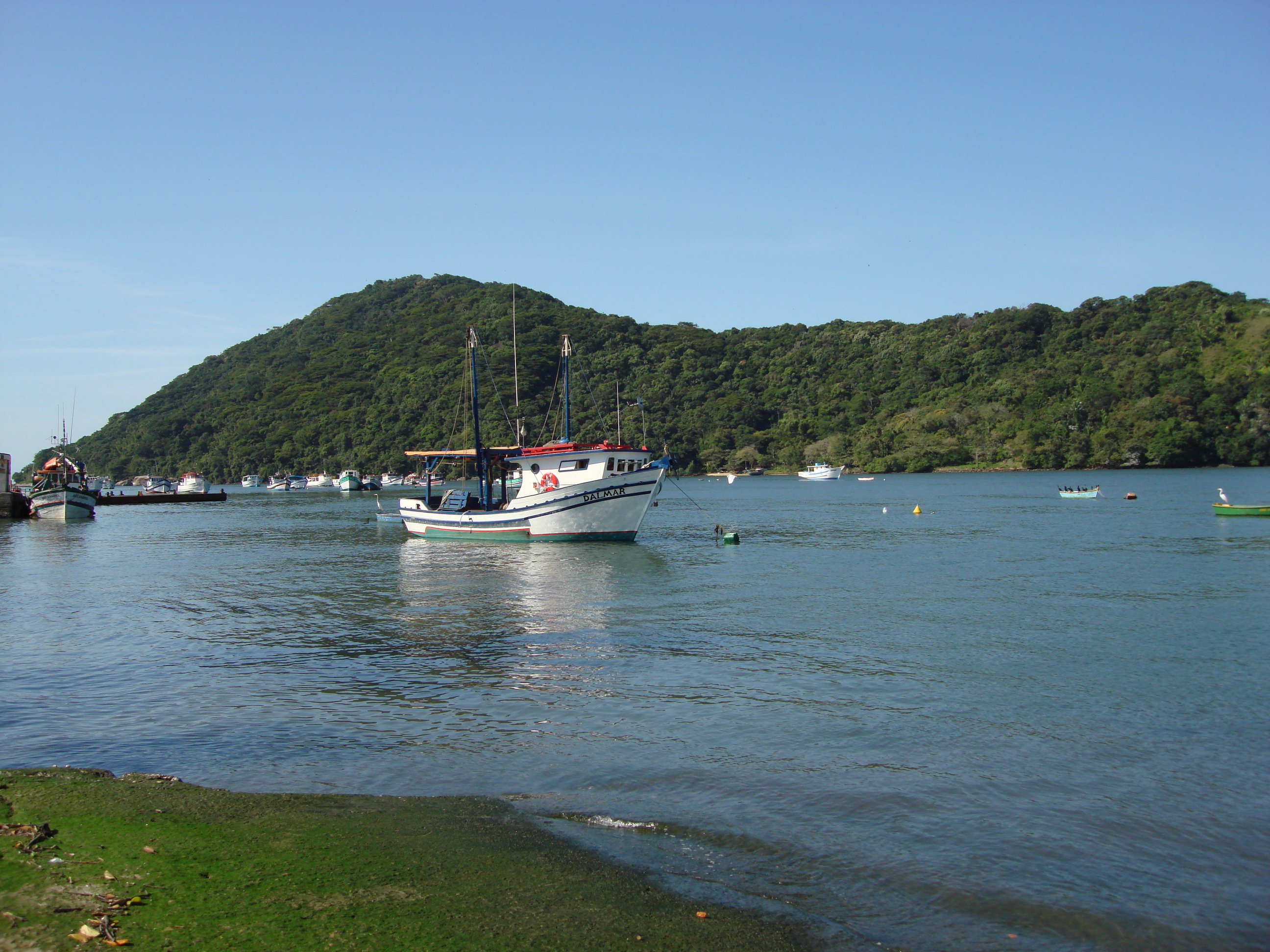 Canal de Bertioga, São Paulo